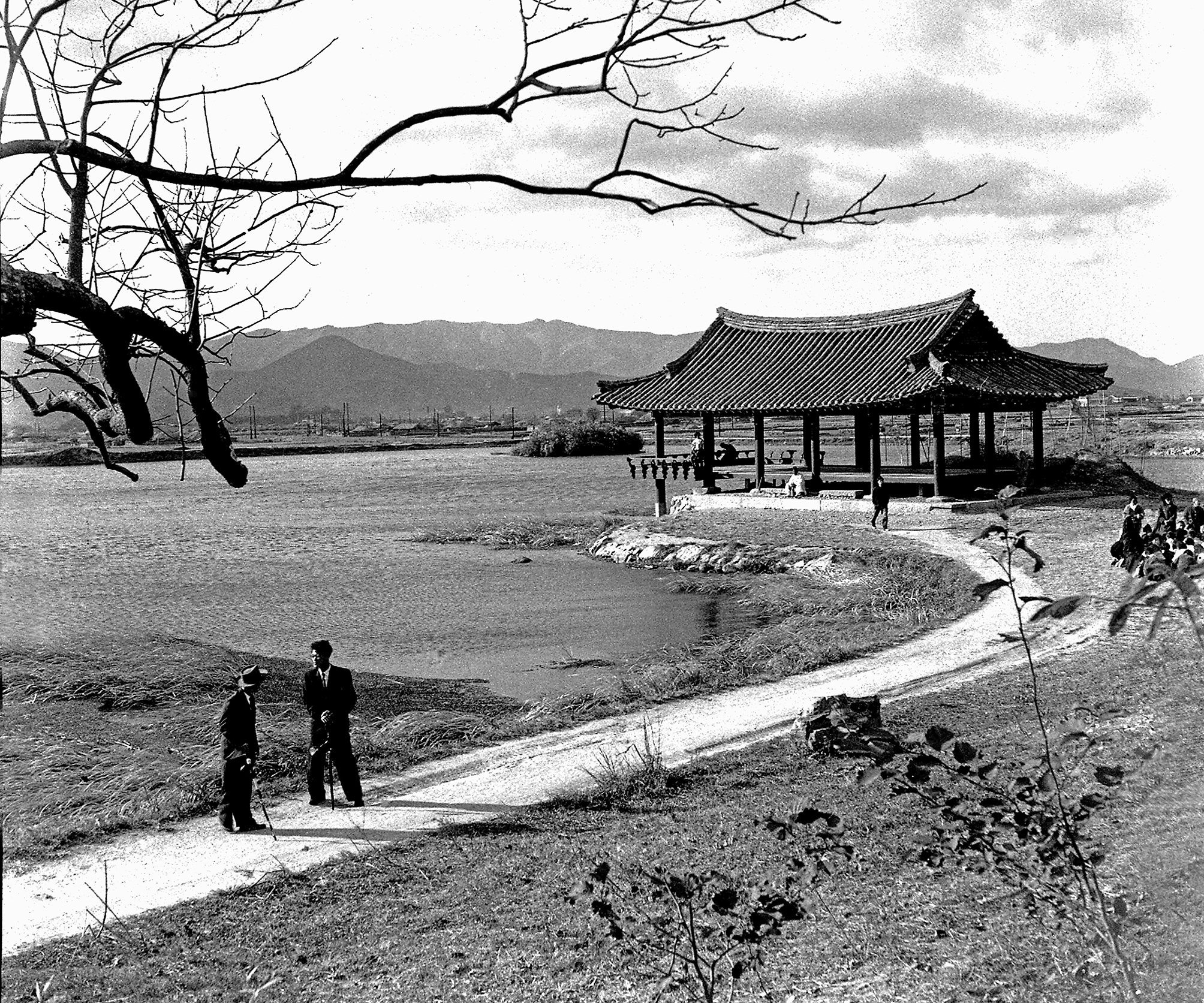 1954년 중학교 3학년 때 경주 수학여행 때 촬영함.